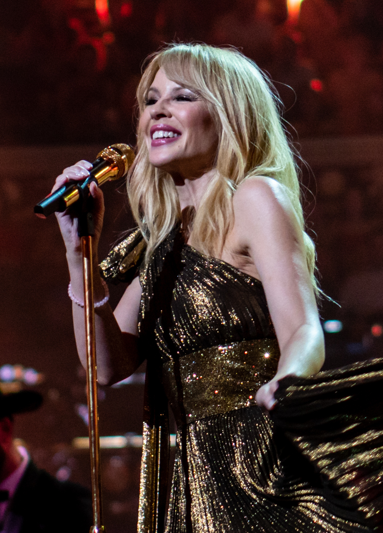 QueenbdayRAH210418-9